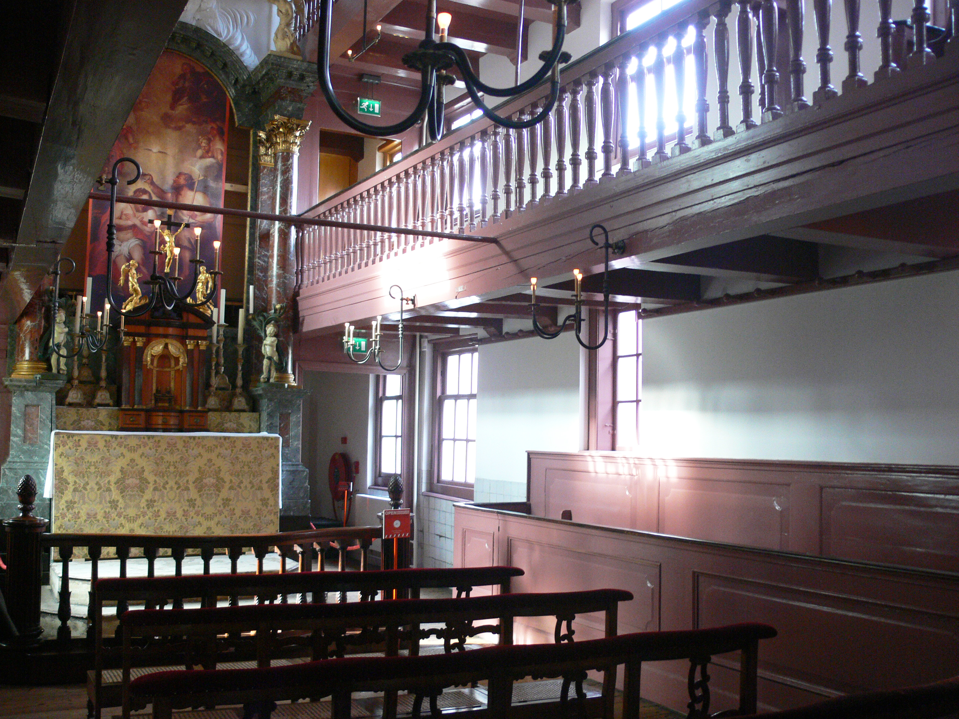 Amsterdam - Museum Ons' Lieve Heer op Solder